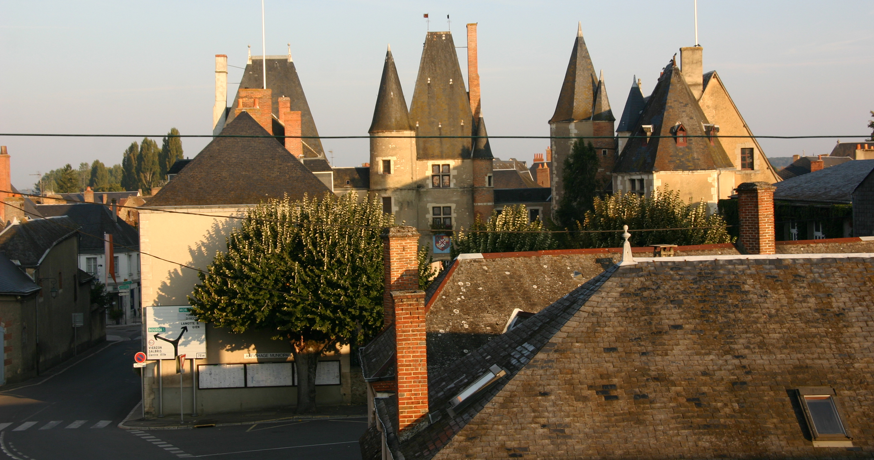 Aubigny-sur-Nère